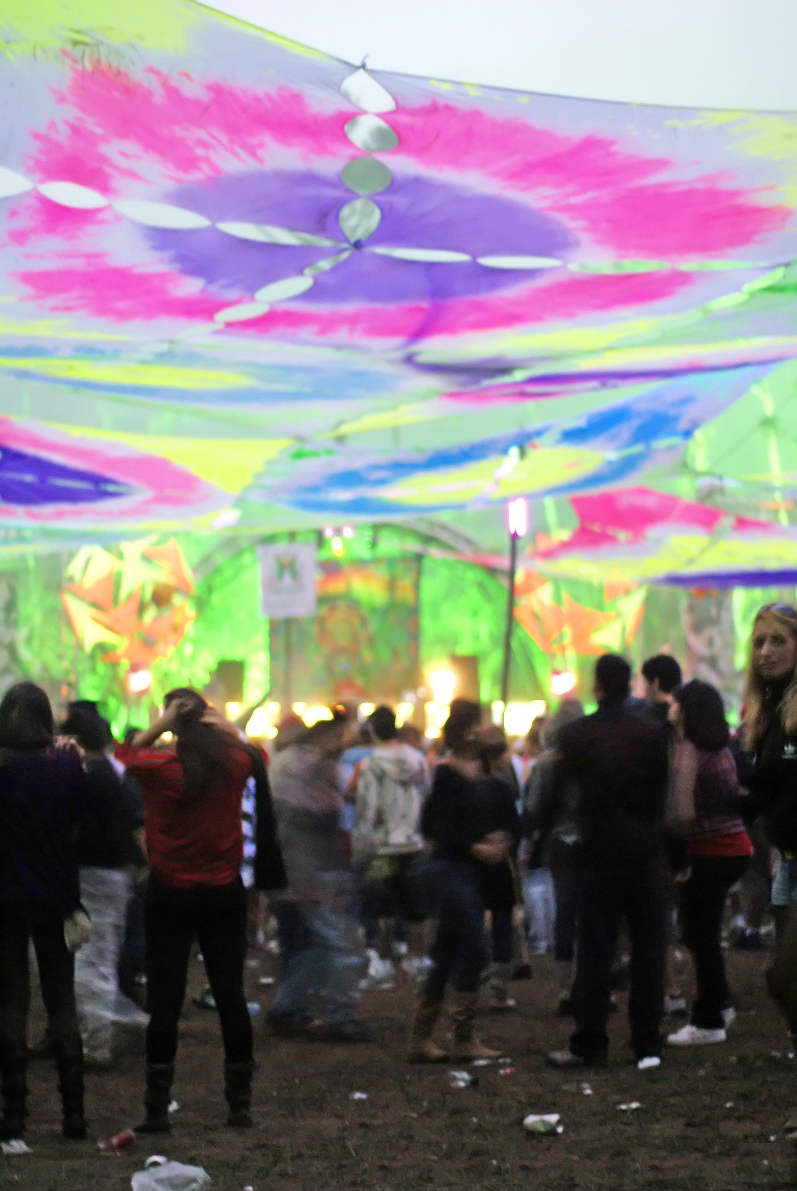 Rave em Juiz de Fora / Minas Gerais / Brasil.